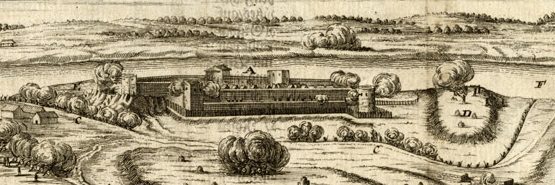 Venelased piiravad Selpilsi 1704.